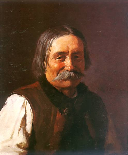 Portrait of Wojciech Roj, oil on wood, 31,5 x 26 cm, Muzeum Tatrzańskie, Zakopane